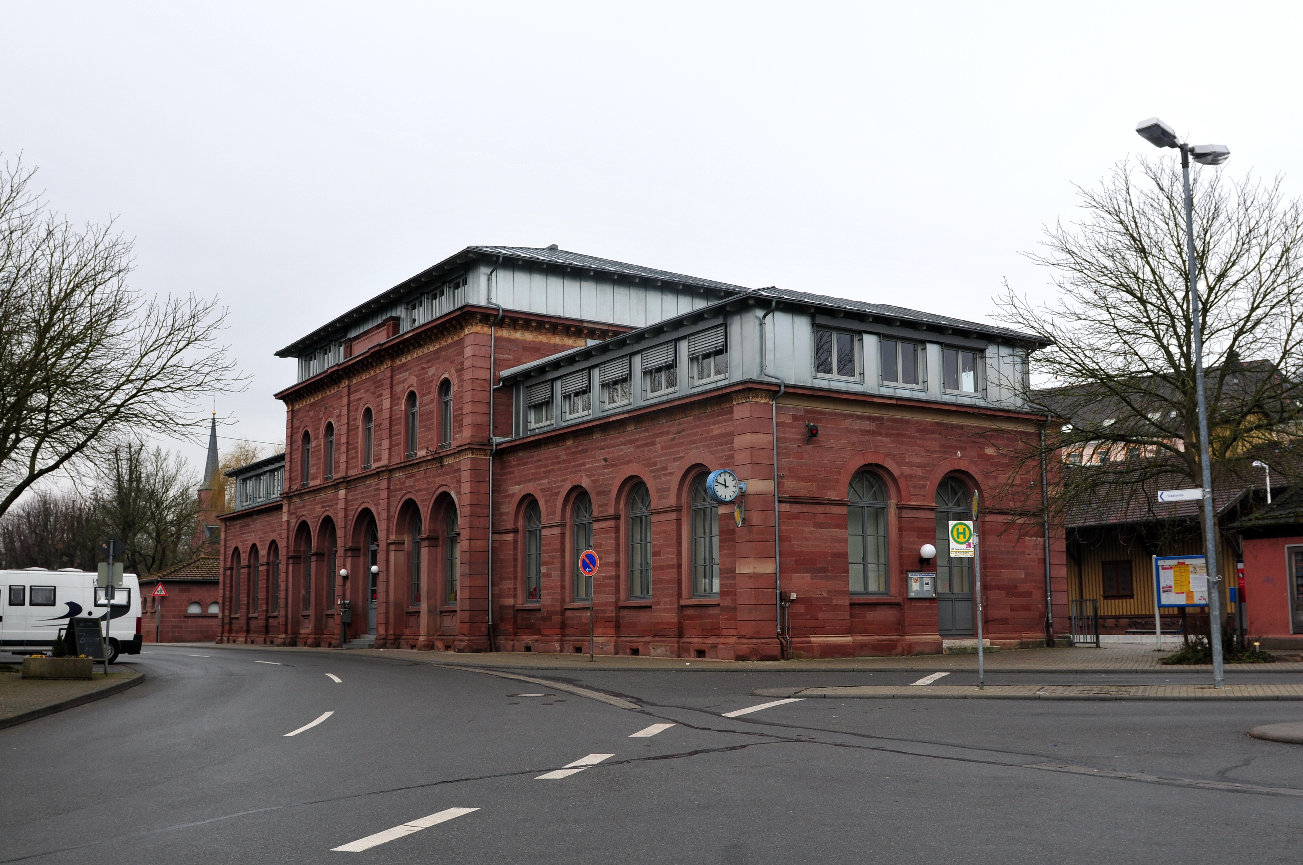 Tauberbischofsheim